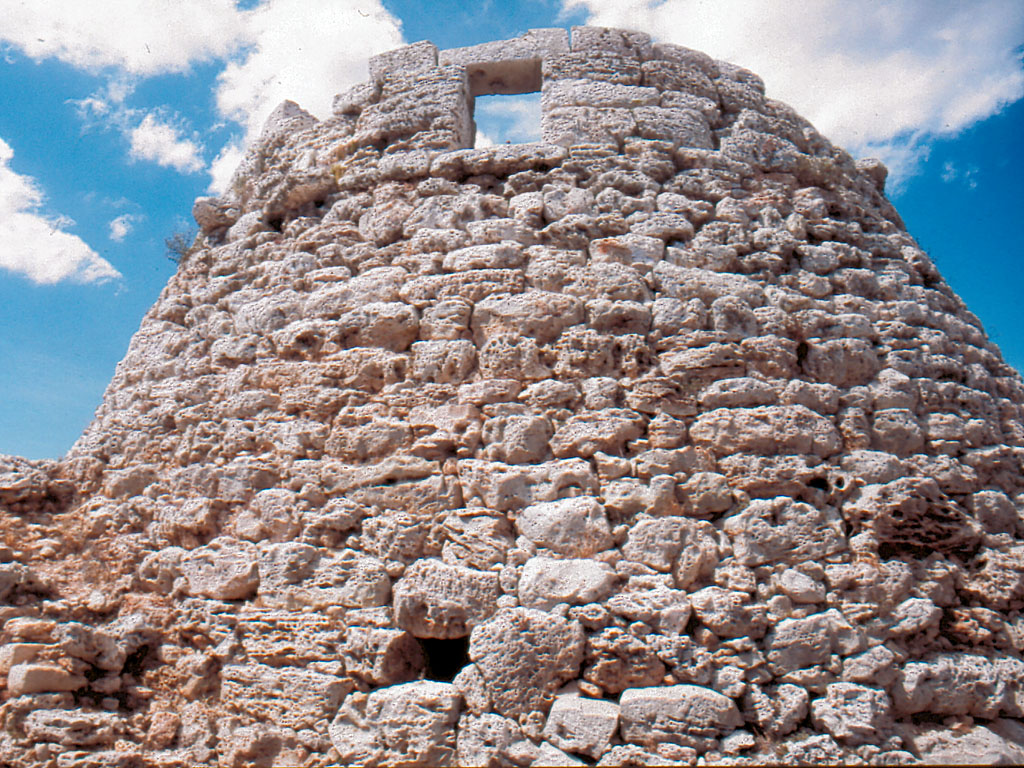 Talaiot de Torelló, o sa Talaia, a Torellonet Vell (Maó, Menorca)